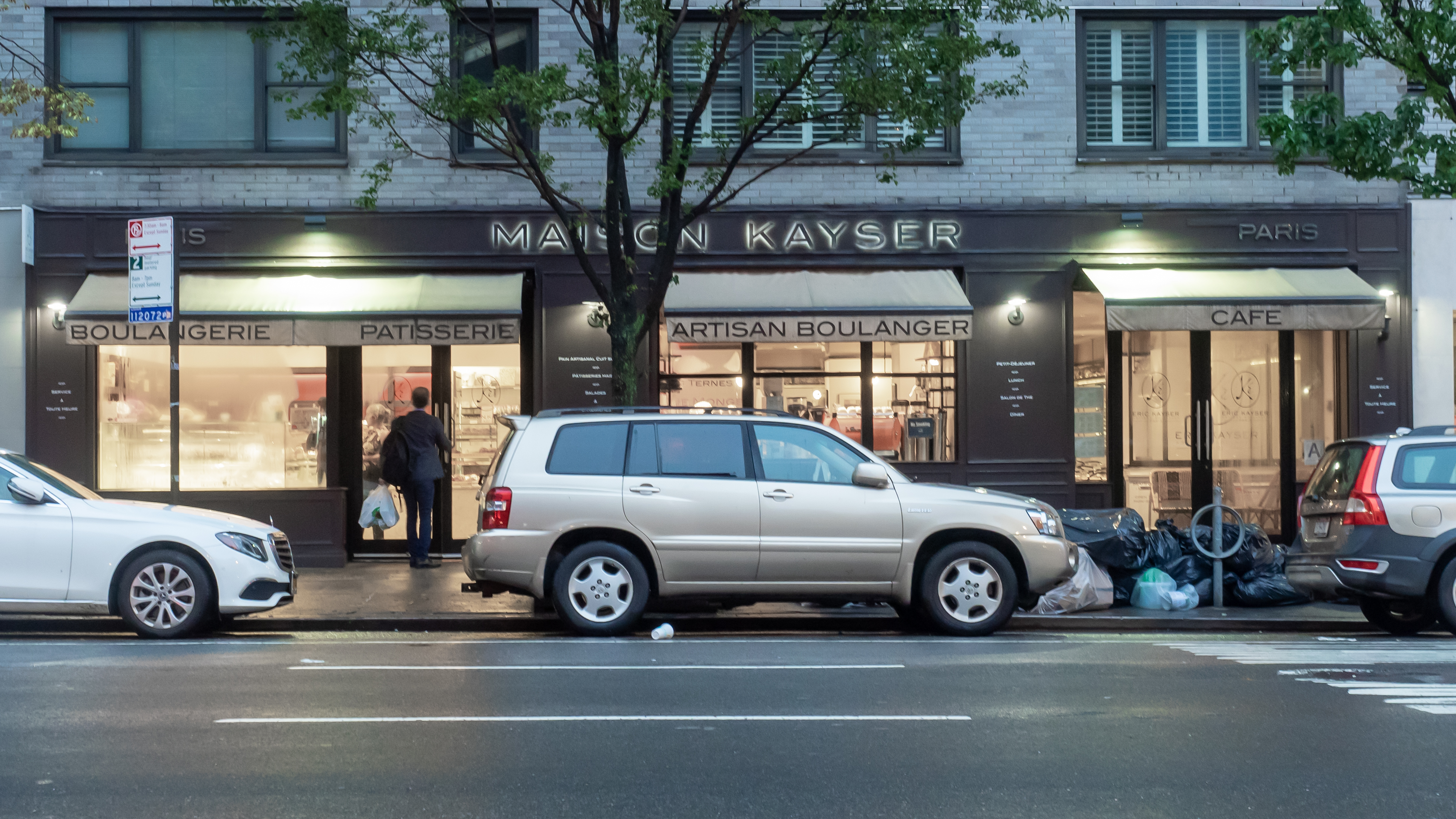 Upper East Side, NYC